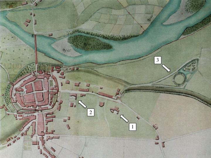 Aarau auf dem Aareplan von Samuel Kyburz, 1809. 1: Meyerhaus. 2: Kantonsschule. 3: Telliring (von Moser konzipierte älteste Sportanlage der Schweiz).